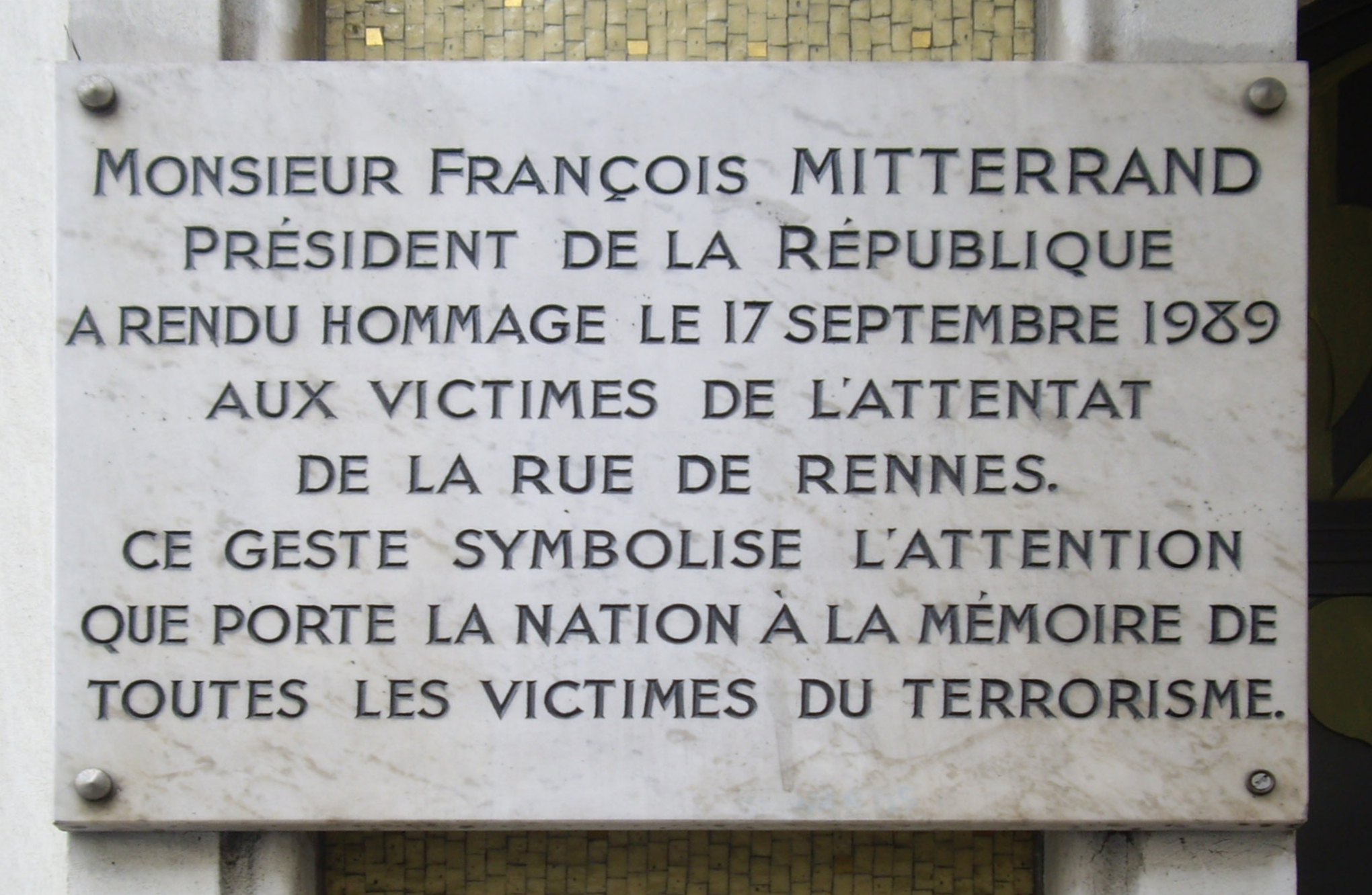 Plaque apposée au n° 140 bis de la rue de Rennes, Paris 6e, en mémoire des victimes de l'attentat du 17 septembre 1986. « Monsieur François Mitterrand, Président de la République, a rendu hommage le 17 septembre 1989 aux victimes de l'attentat de la rue de Rennes. Ce geste symbolise l'attention que porte la nation à la mémoire de toutes les victimes du terrorisme. »